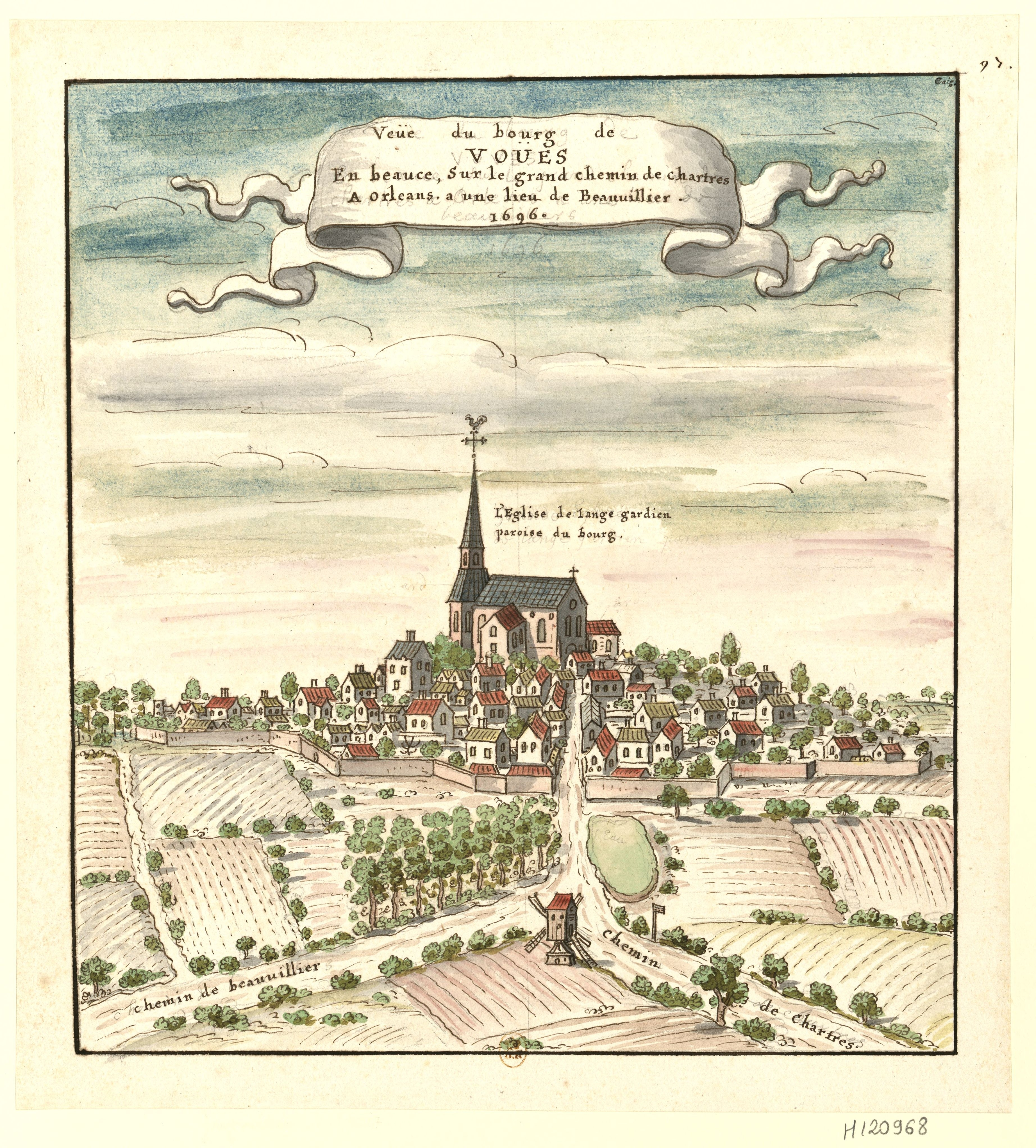 "Veüe du bourg de // VOUES // En beauce, sur le grand chemin de Chartres // A Orleans, a une lieu de Beauvillier // 1696"